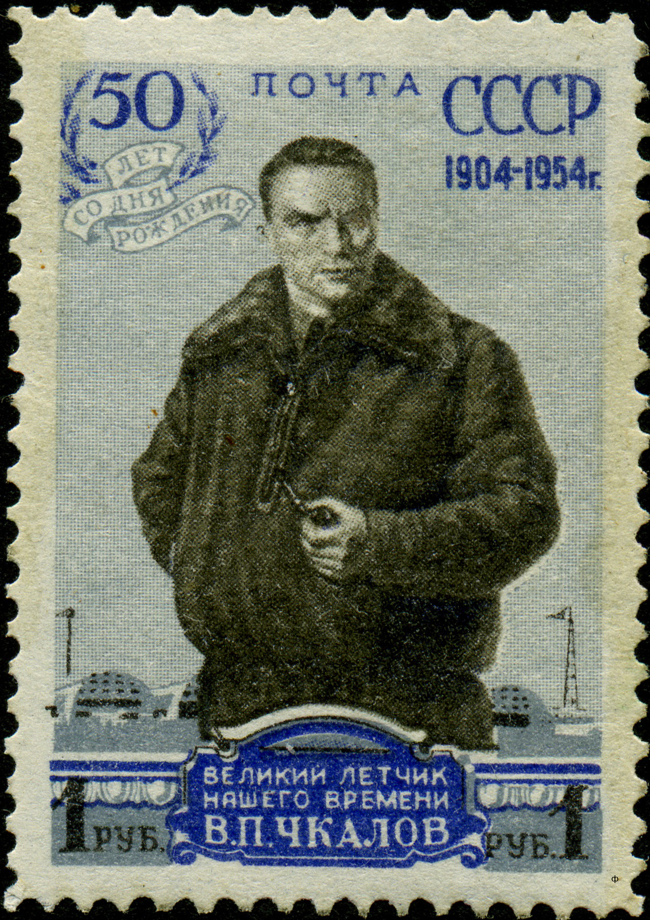 Почтовая марка СССР - Чкалов Валерий Павлович, Герой Советского Союза